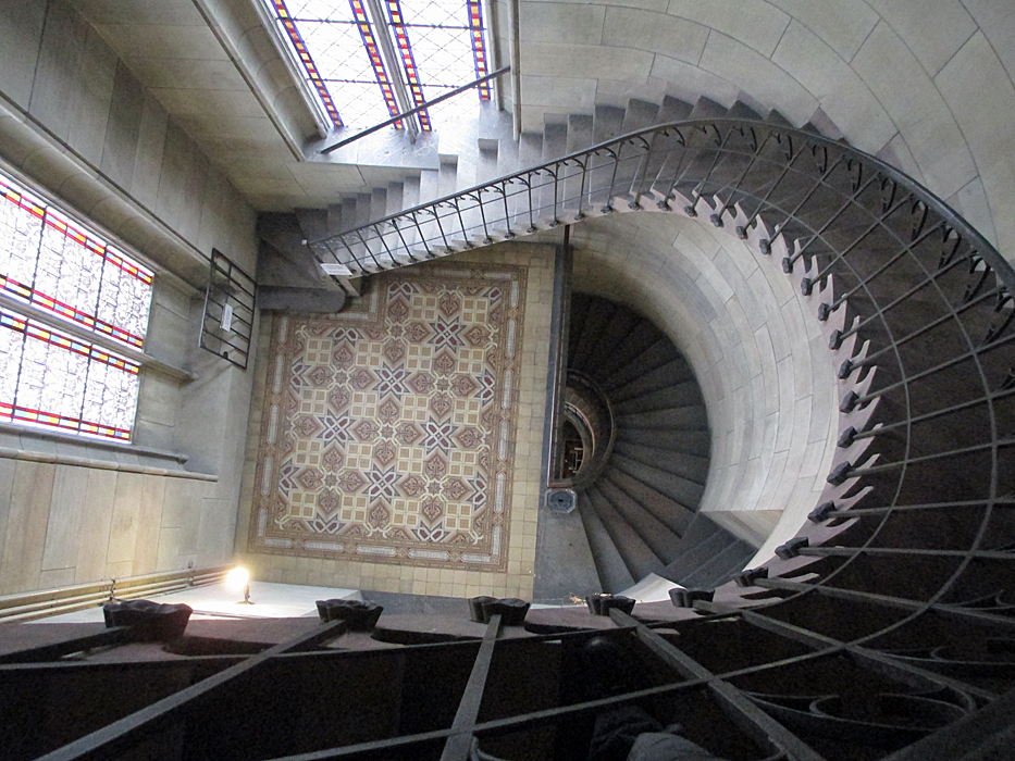 Offene Kirche St. Elisabeth, Basel. Treppenaufgang im Turm.